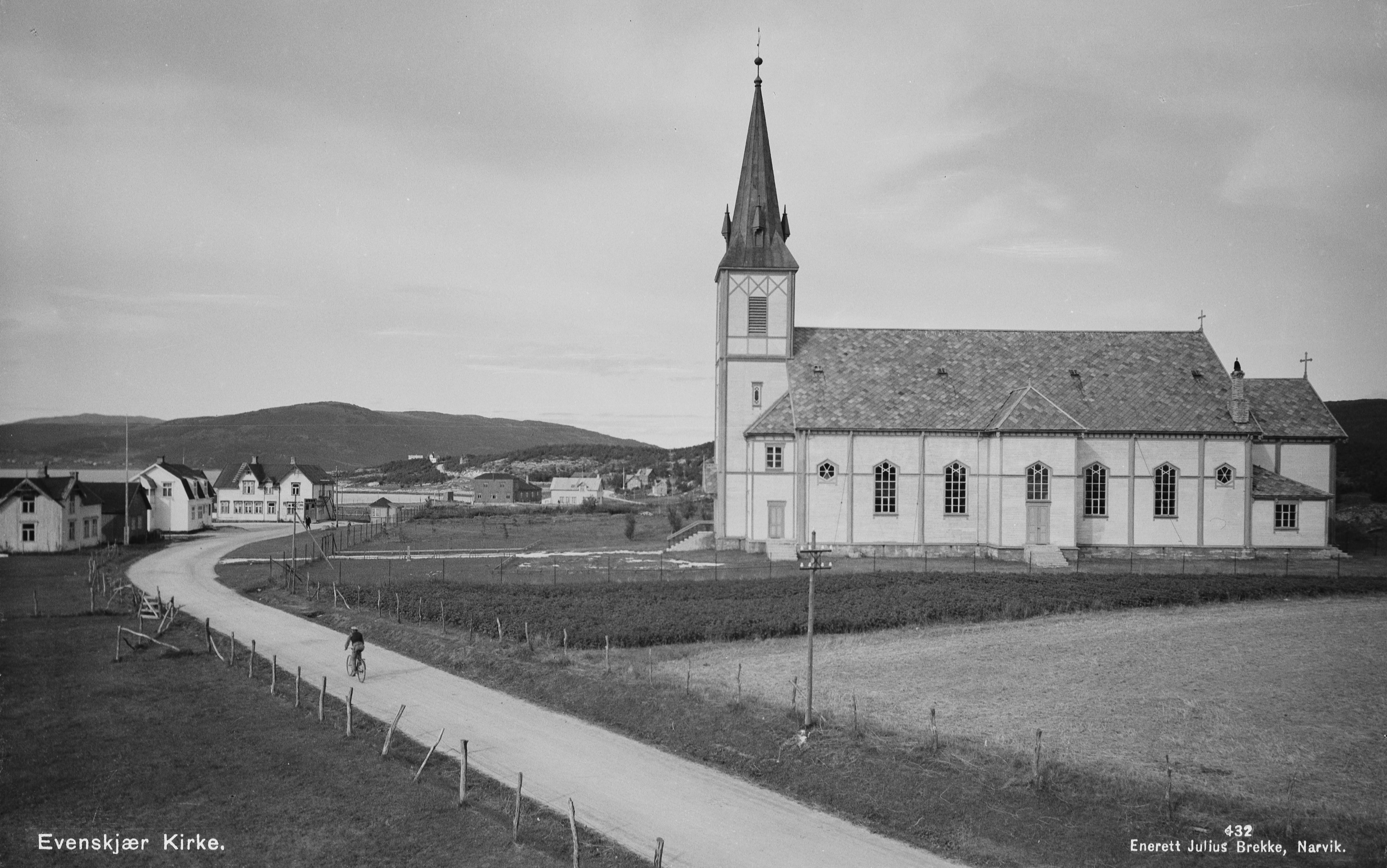 Skånland kirke, Evenskjær. Mittet-postkort fra Riksantikvarens Kulturminnebilder.no.